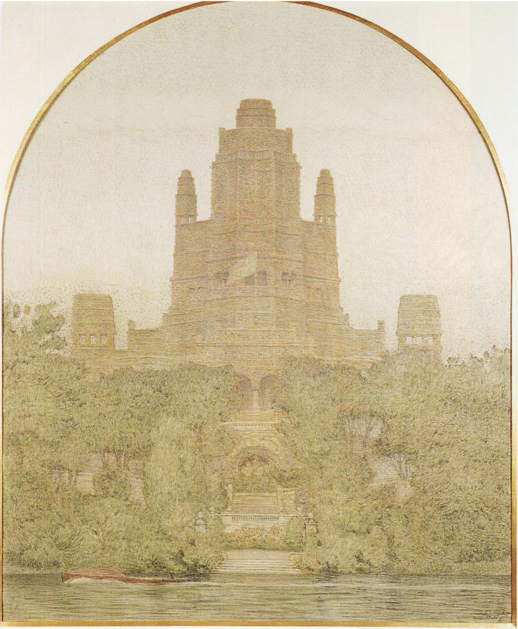 Fasadritning för Nobelpalatset (Fasad mot Djurgårdsbrunnsviken)